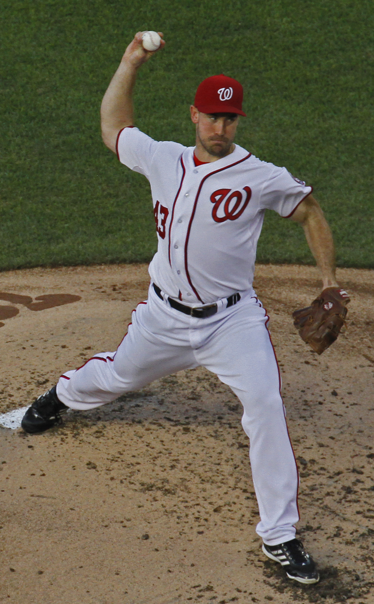 Ross Ohlendorf